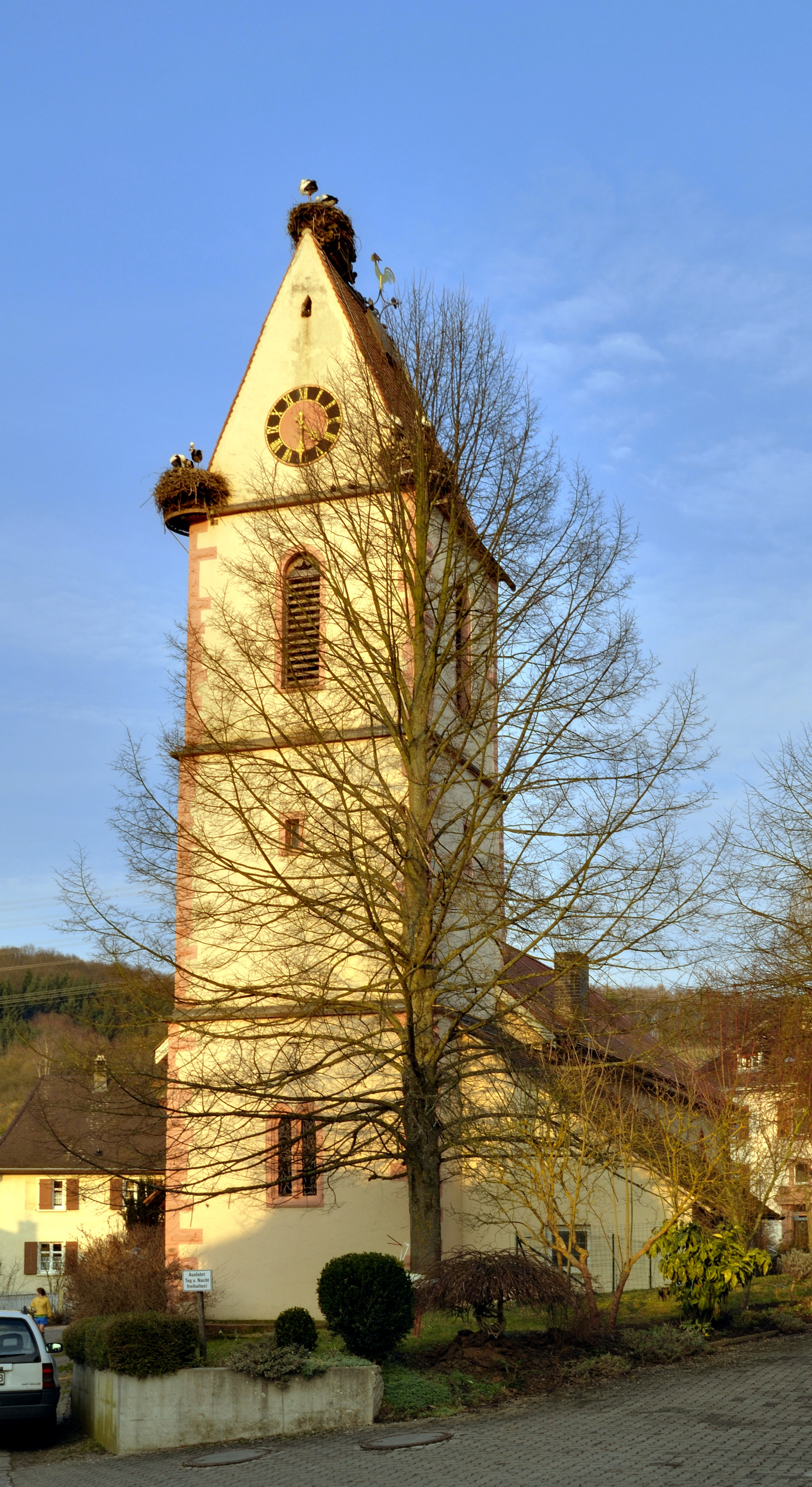 Holzen: Kirche